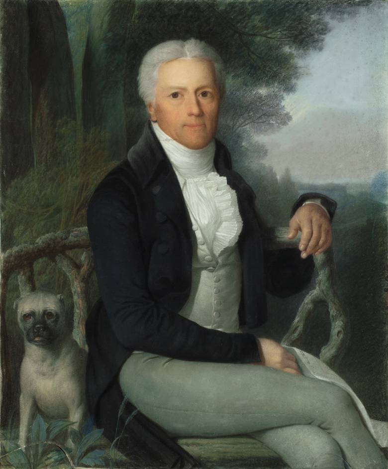 Porträt des Fürsten Karl August von Hardenberg, Pastell auf Pergament. 88 x 73 cm. Unten rechts Reste der Signatur: D. Caf[e] fec.